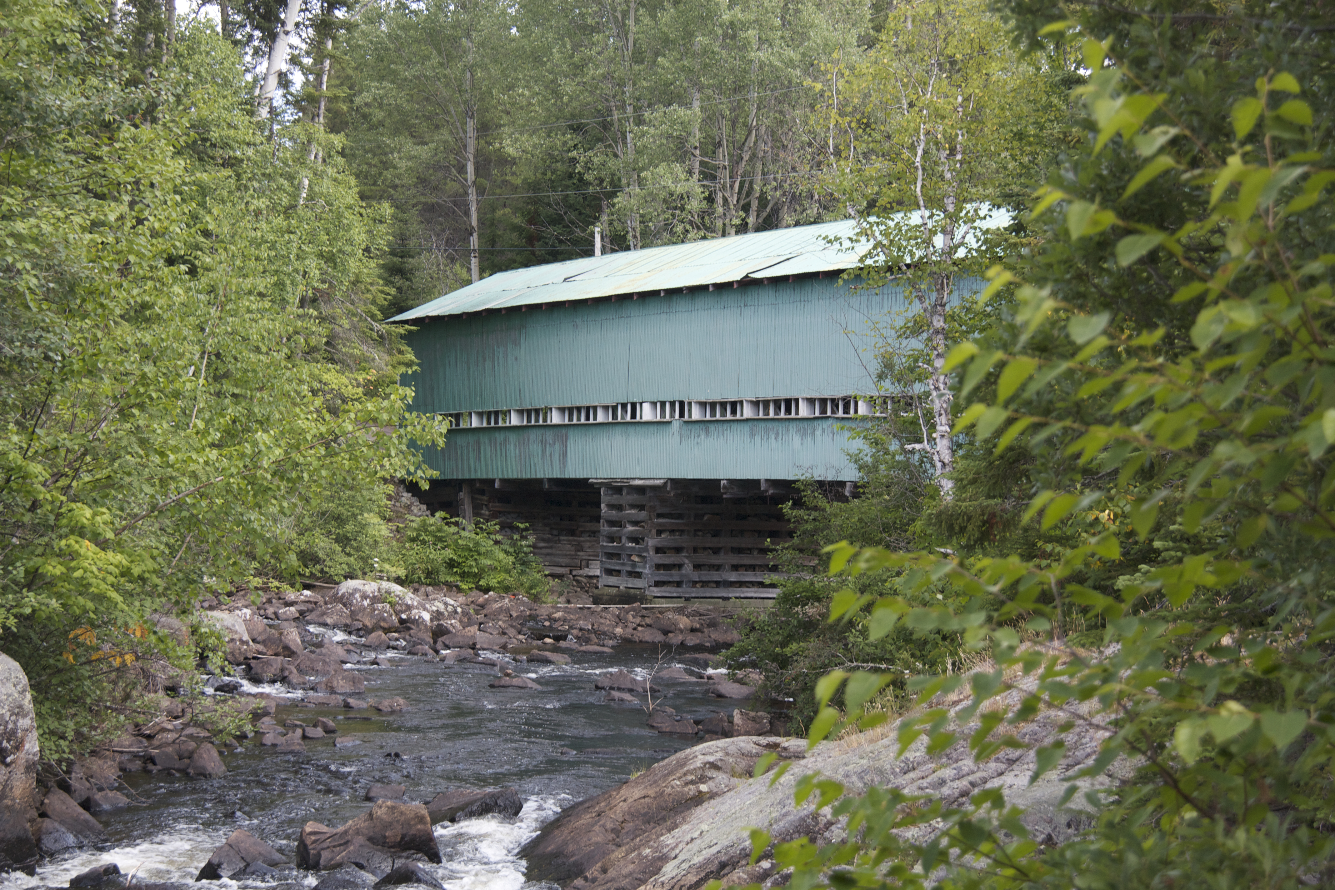 Le pont du Lac-Ha! Ha! enjambe la Rivière des Ha! Ha! depuis 1934. Il mesure 37 m de long et 3,66 de haut. Il serait le seul pont couvert du Québec dont le lambris est en tôle ondulée